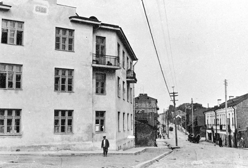 Беларуская (тарашкевіца): Менск (Miensk), будынак на рагу вуліцы Гарадзкога Вала (Haradzki Vał) і Койданаўскай (vulica Kojdanaŭskaja)